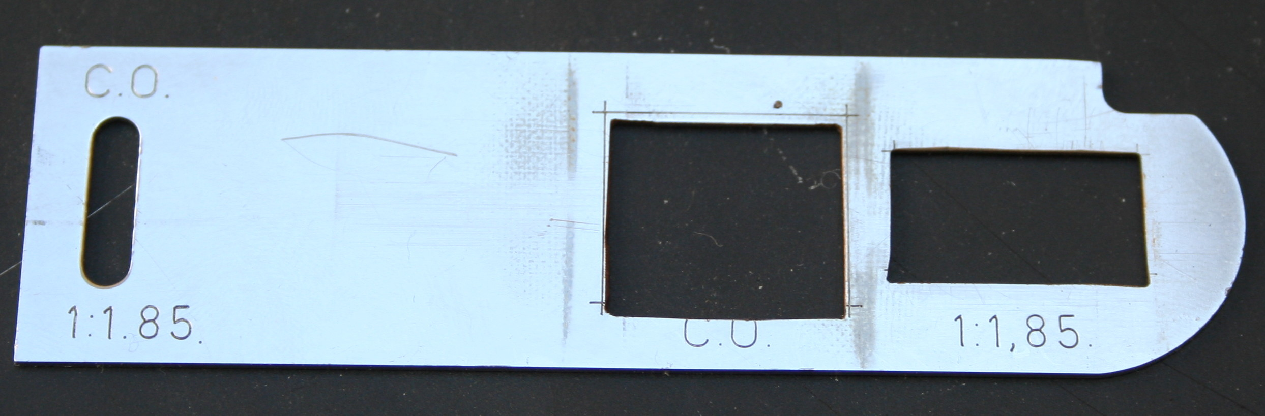 Bildmaske